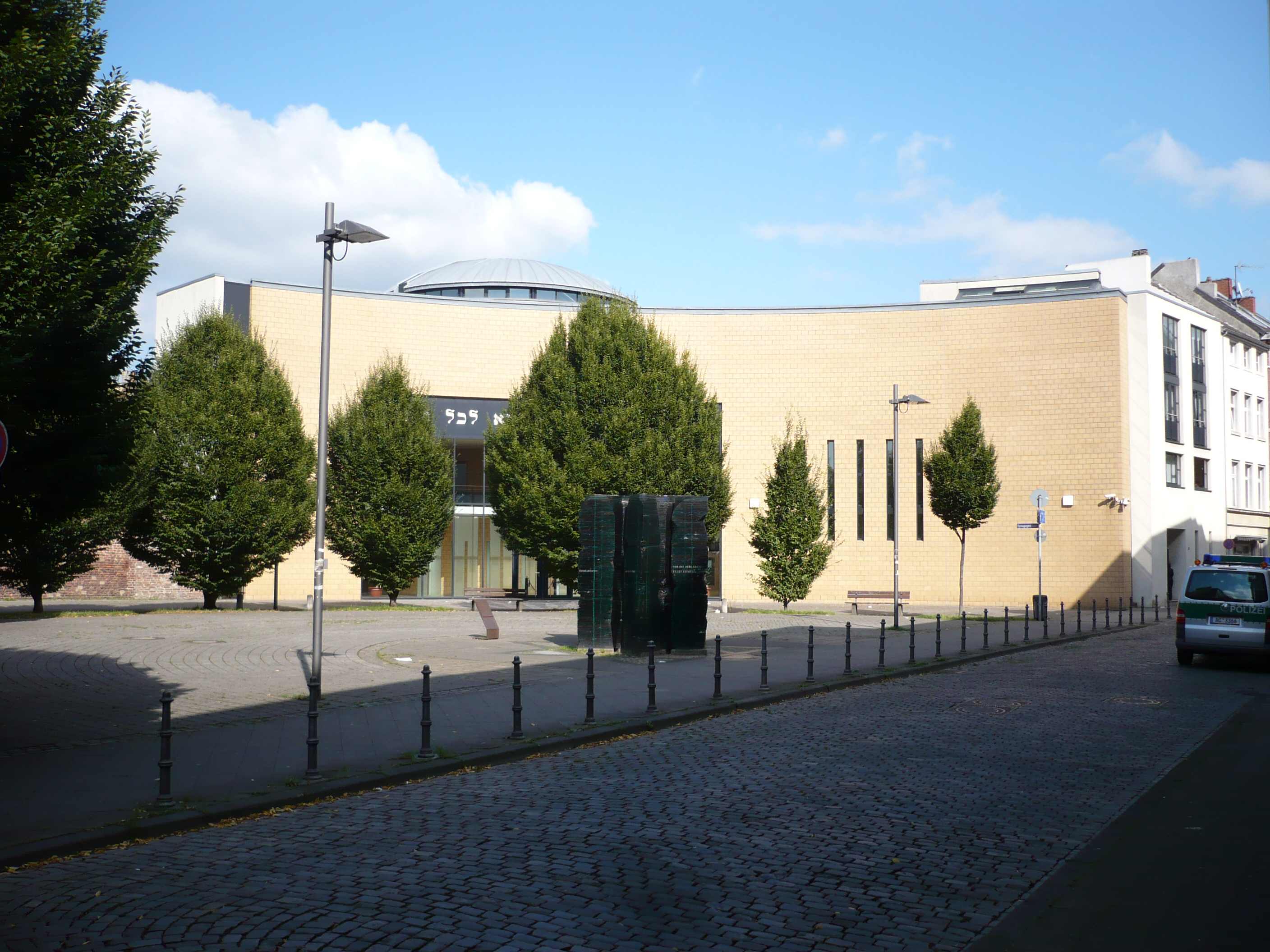 Synagoge in Aachen, Synagogenplatz